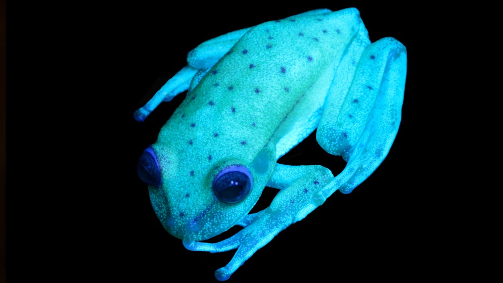 Los científicos del Museo Argentino de Ciencias Naturales Bernardino Rivadavia (MACN- Conicet) revelaron durante este año la existencia de 149 especies nuevas como resultado del trabajo de campo, la preparación, curación, preservación y estudios genéticos y morfológicos. Otro hallazgo que adquirió gran relevancia fue el de la rana Hypsiboas punctatus, distinguida por tratarse del primer caso conocido de fluorescencia natural en anfibios.